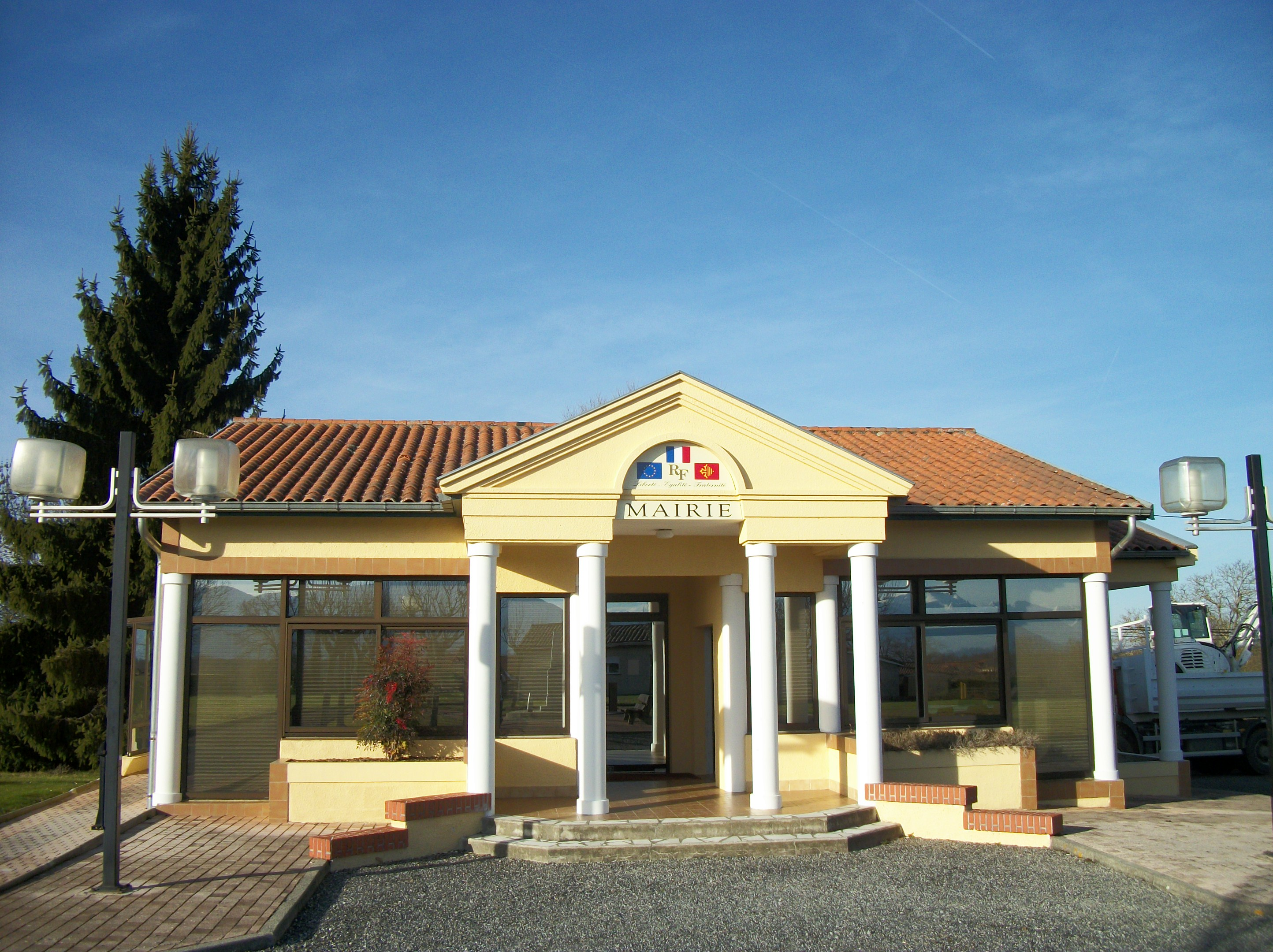 La mairie